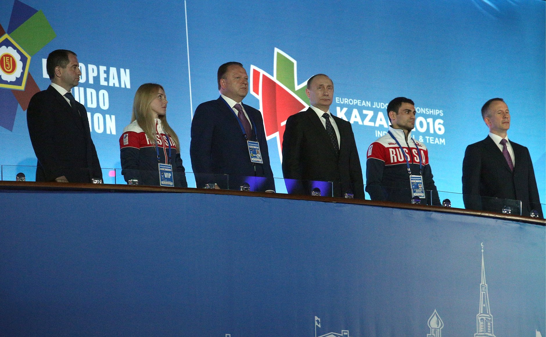 Президент России на церемонии открытия Чемпионата Европы по дзюдо